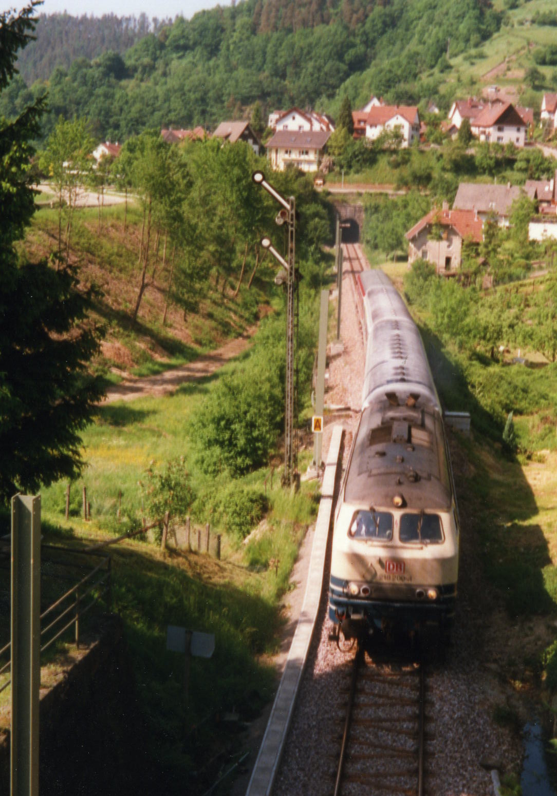 Wendezug auf der Murgtalbahn bei Gausbach, der Fotograf steht auf dem Nordportal des Gausbacher Tunnels, im Hintergrund ist das Südportal des Hacken-Tunnels zu erkennen